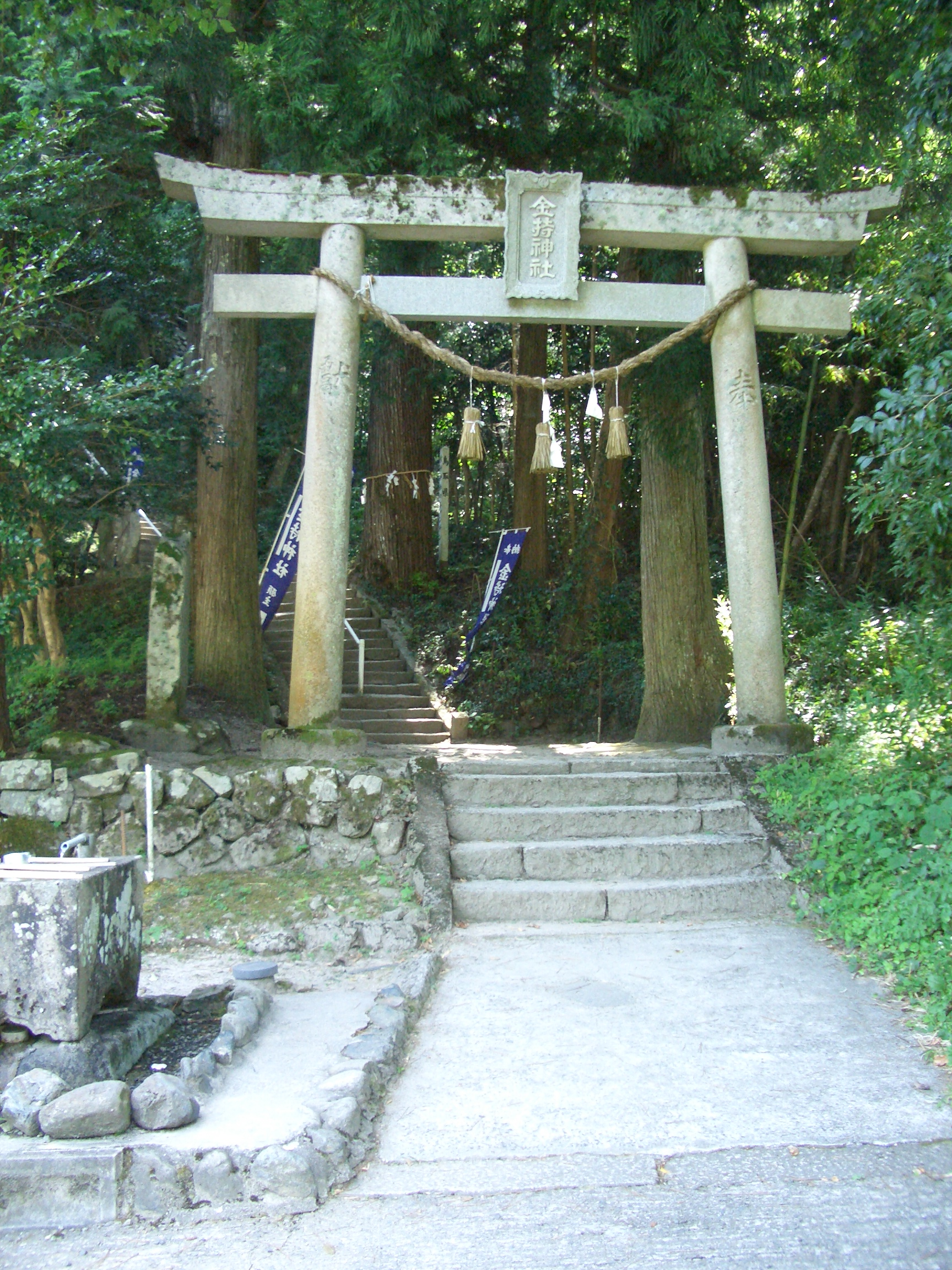 金持神社鳥居